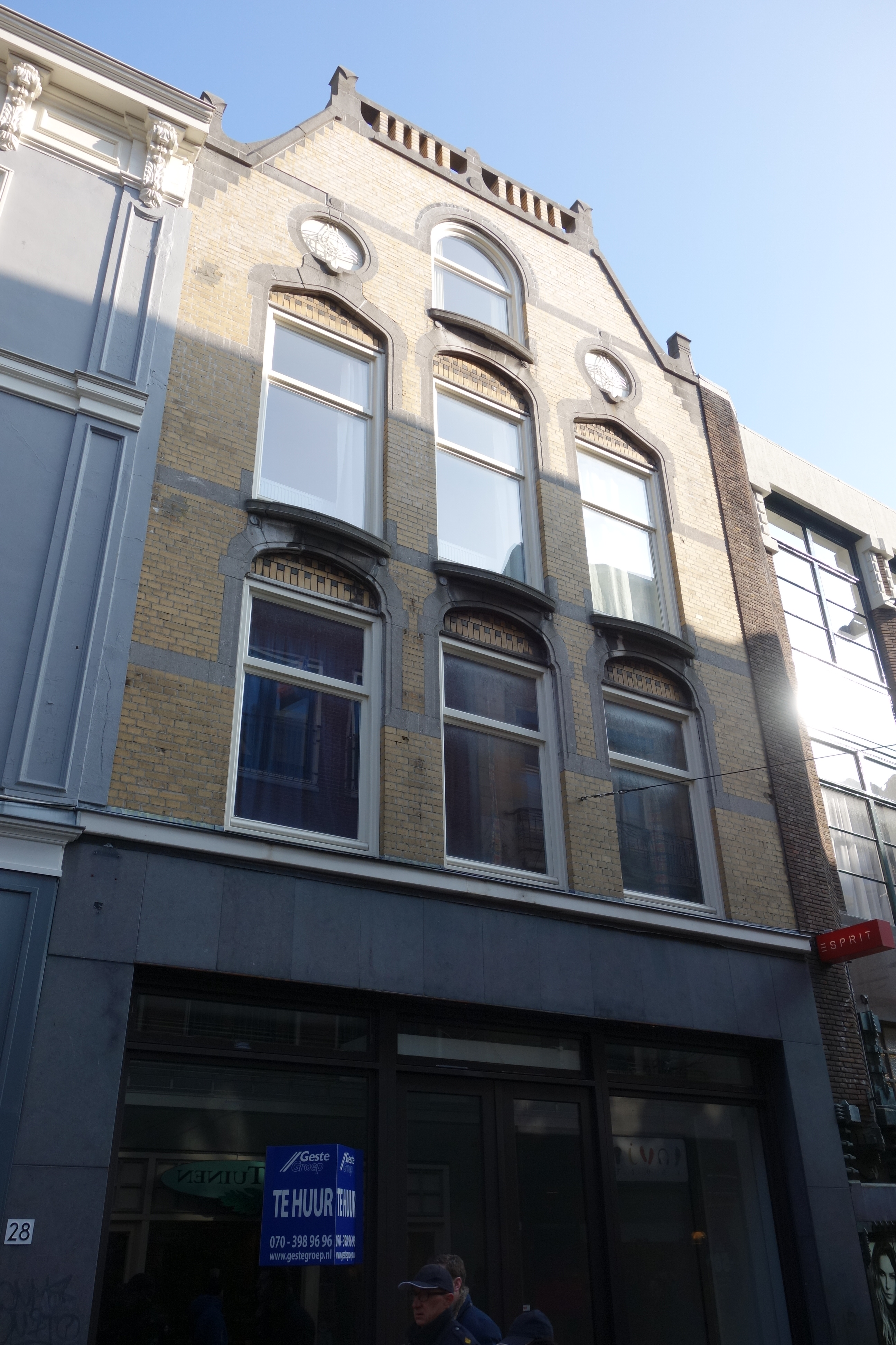 Gevel in overgangsarchitectuur aan de Venestraat in Den Haag.